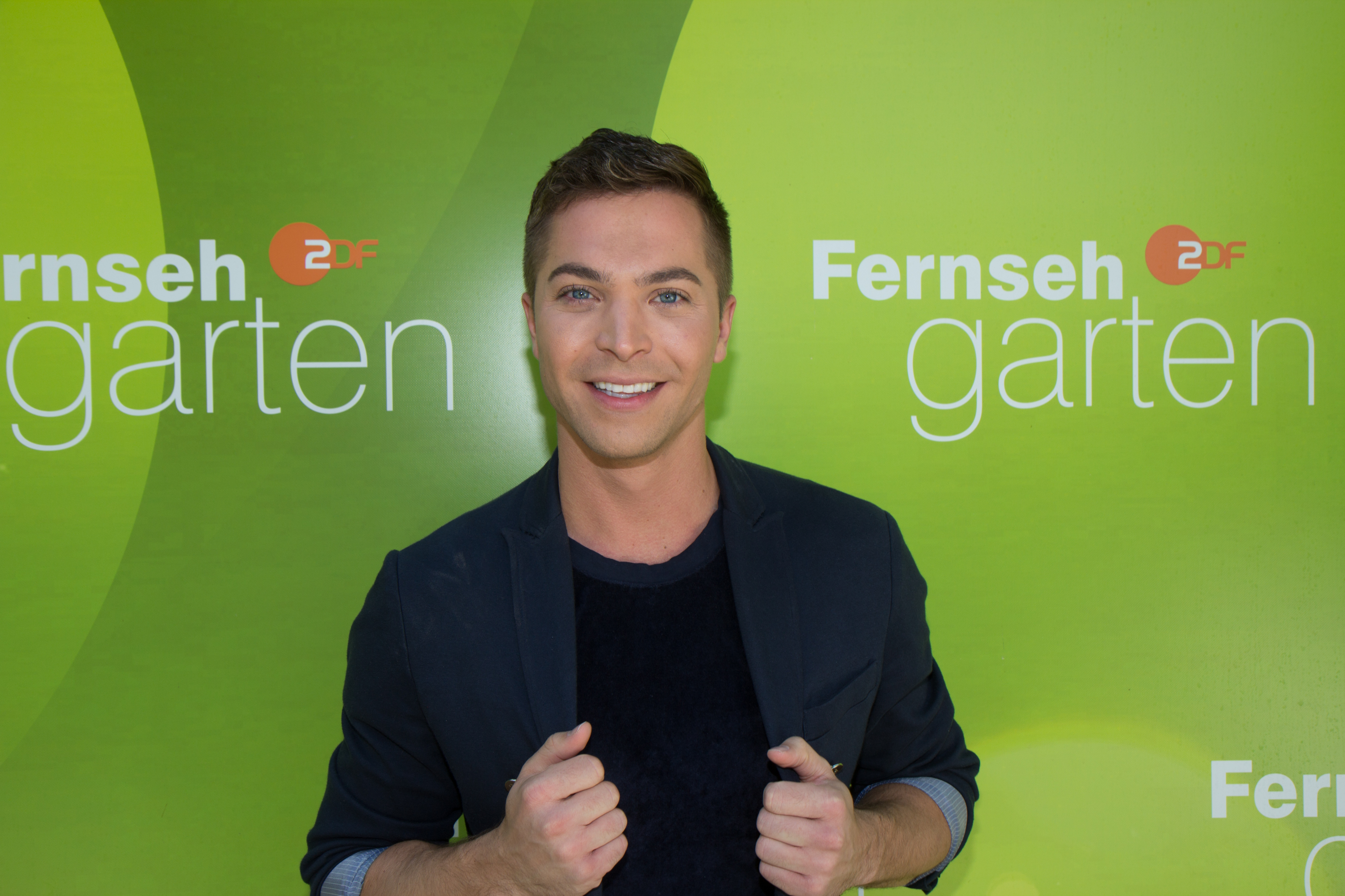 Julian David als Gast im ZDF-Fernsehgarten am 16. September 2018 in Mainz.